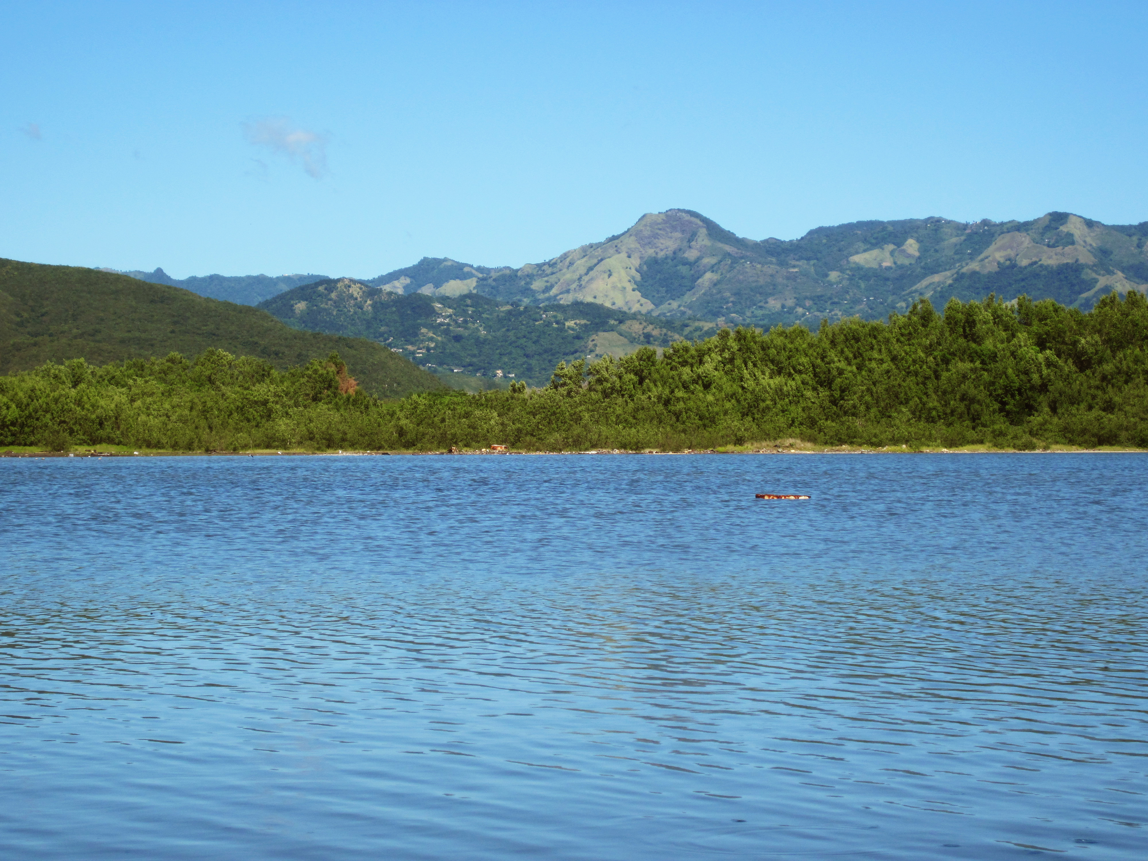 Estuario de la Bahía de Guayanilla. Localización Comunidad El Faro en el Barrio Rufina de Guayanilla Puerto Rico.